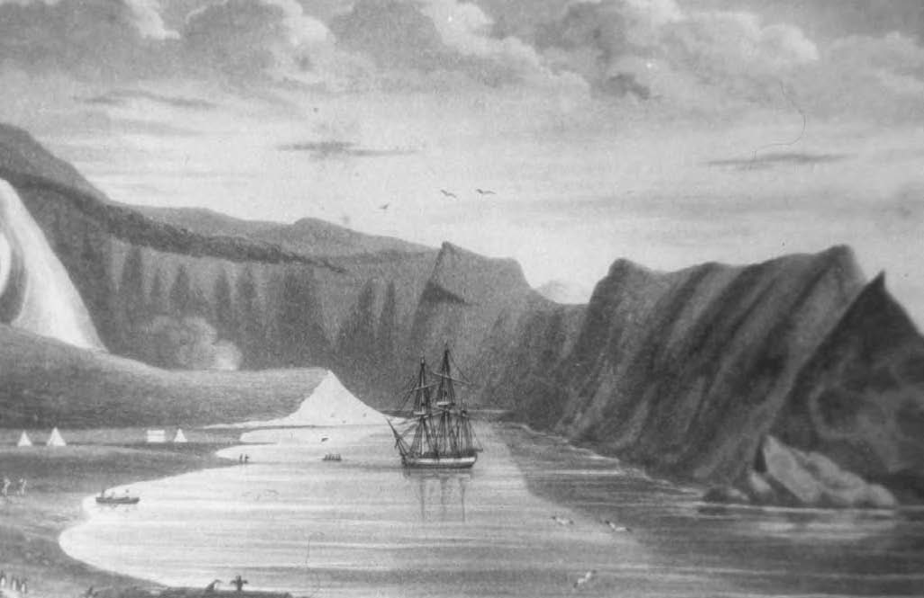 Pendulum Cove, Deception Island, South Shetland Islands, West Antarctica